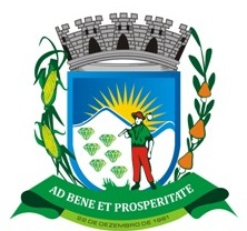 Brasão de Armas do Município de Salgadinho no Estado da Paraíba, Brasil.